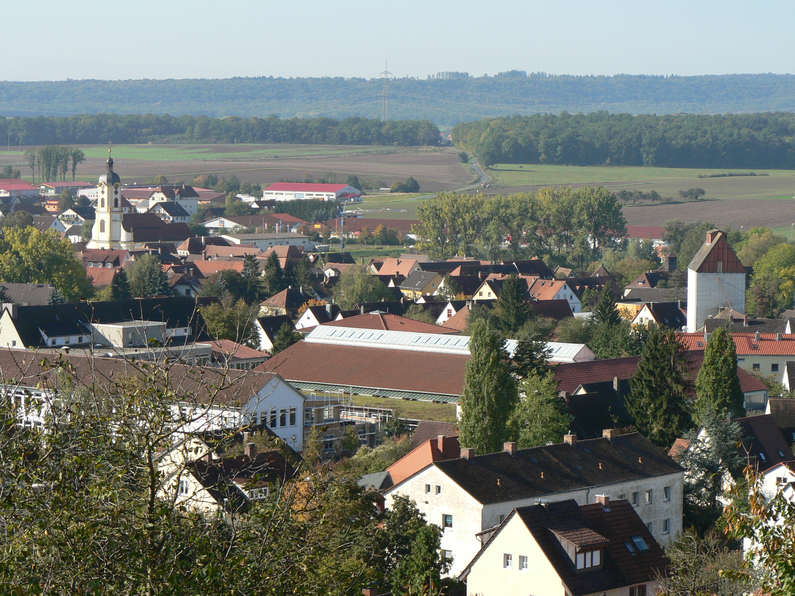 Nordost-Ansicht von Scheinfeld